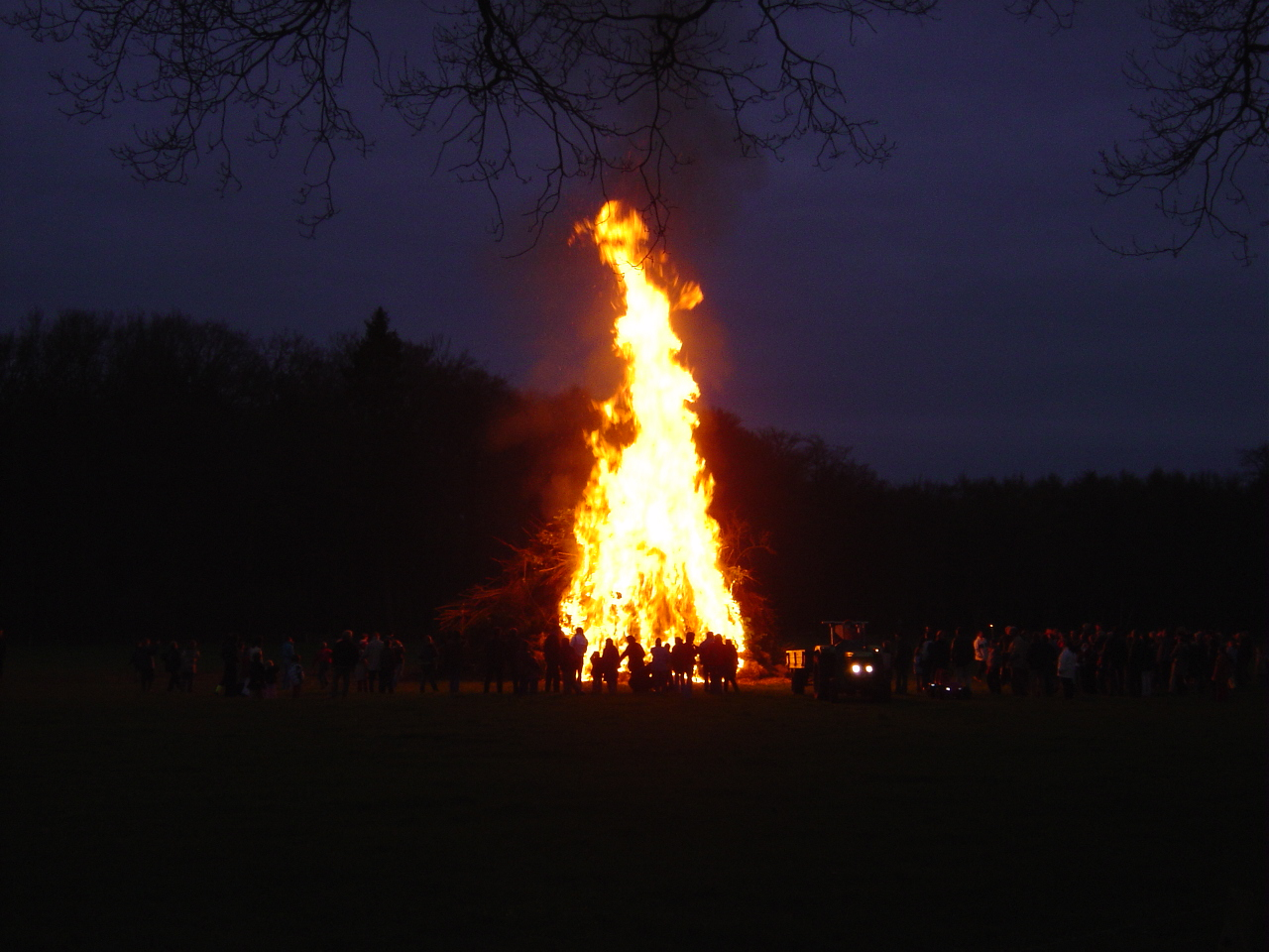 Paasvuur bij Olst (Middel)